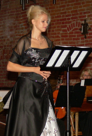 Anita Rywalska-Sosnowska